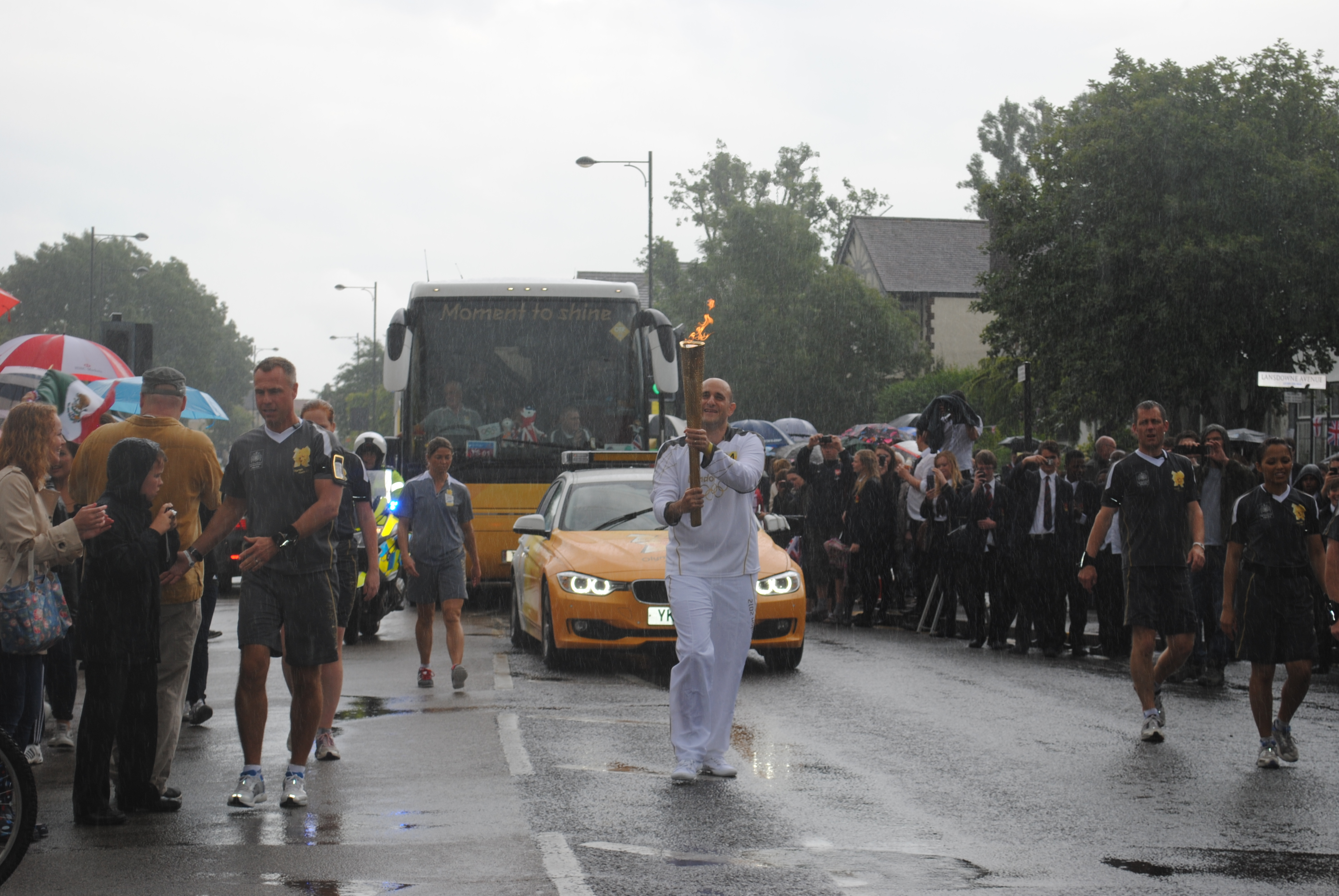 Alberto Lati con la antorcha de Londres 2012